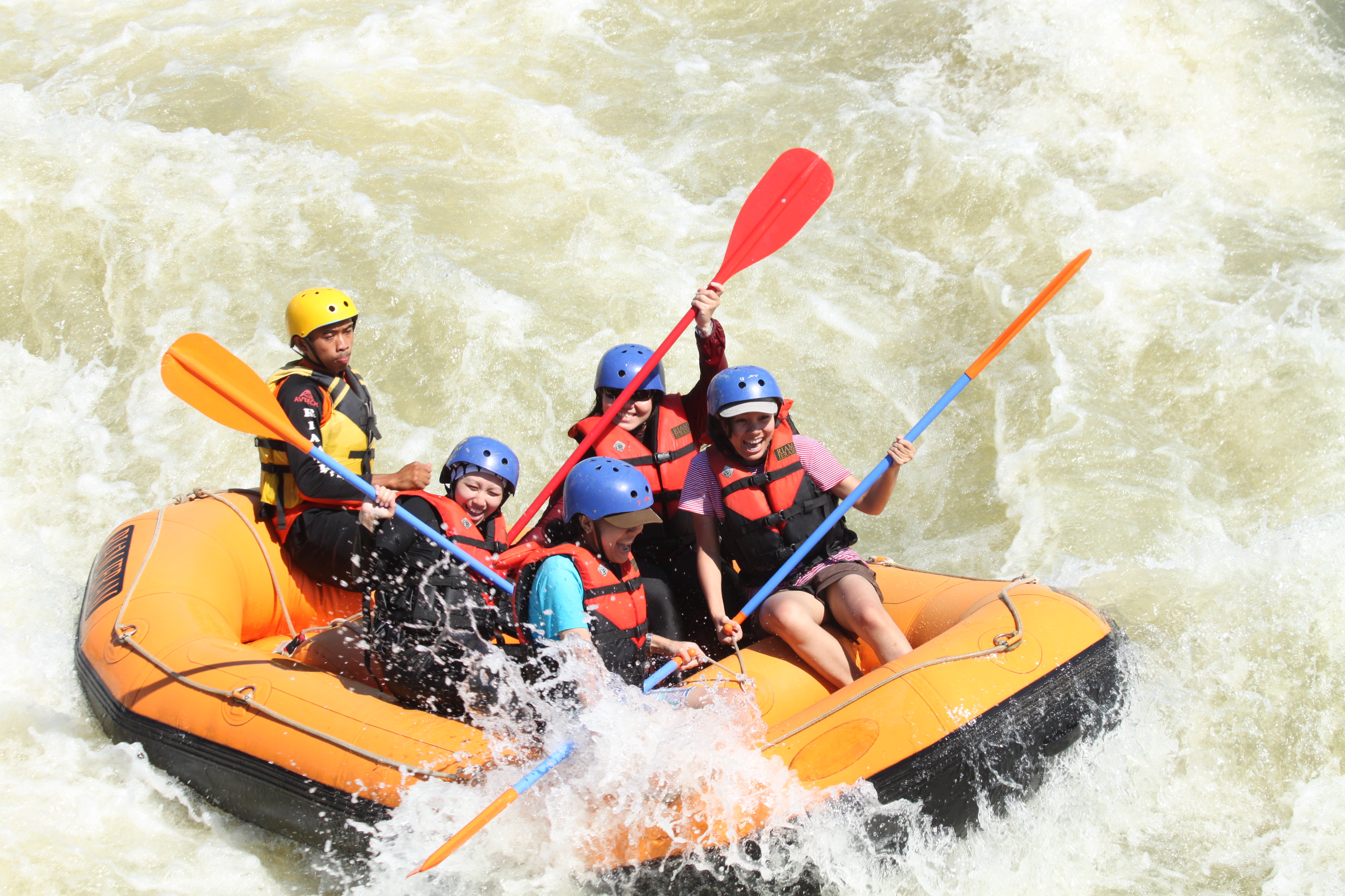 citatih, sukabumi, west java